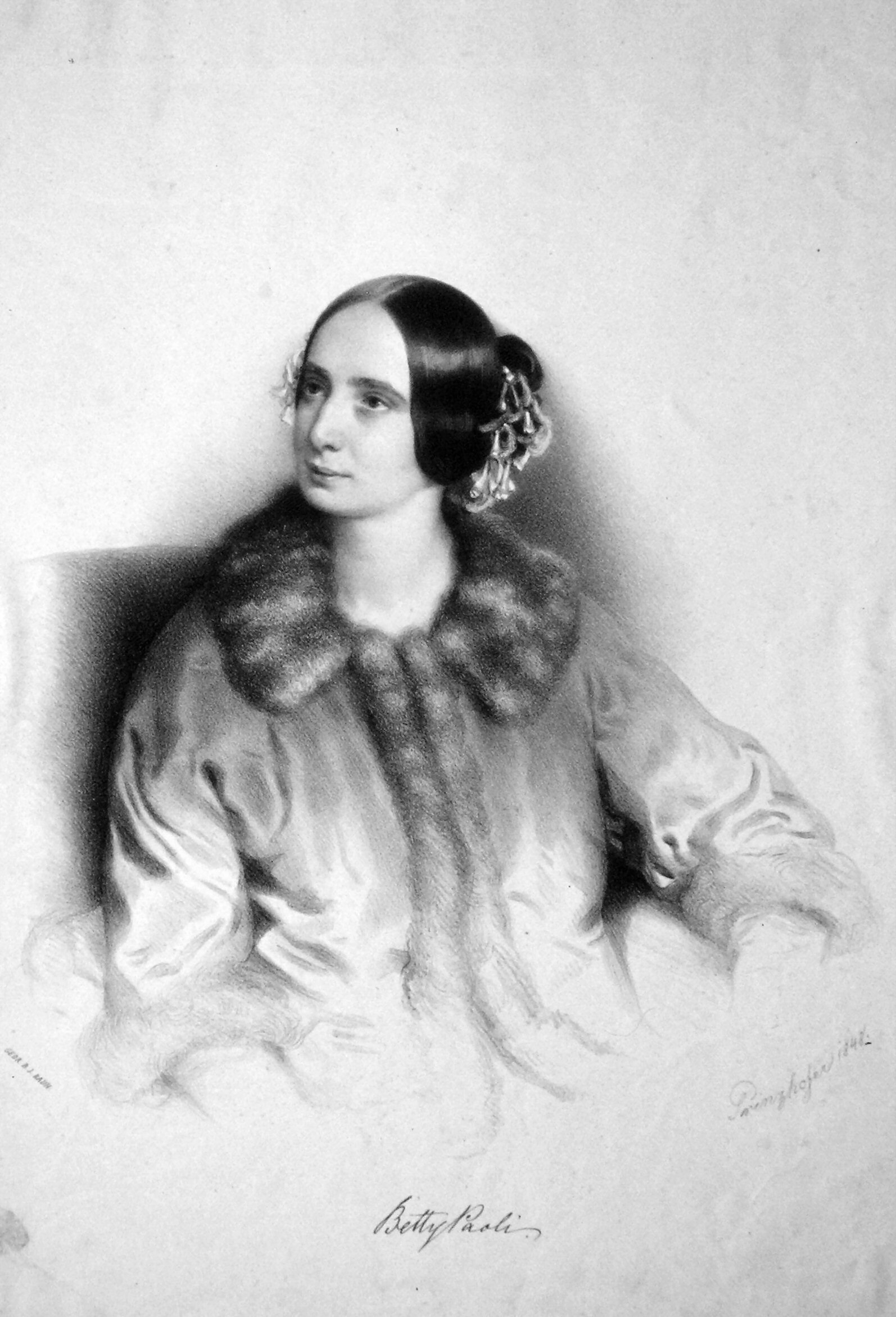 Betty Paoli (1815-1894), österreichische Schriftstellerin.